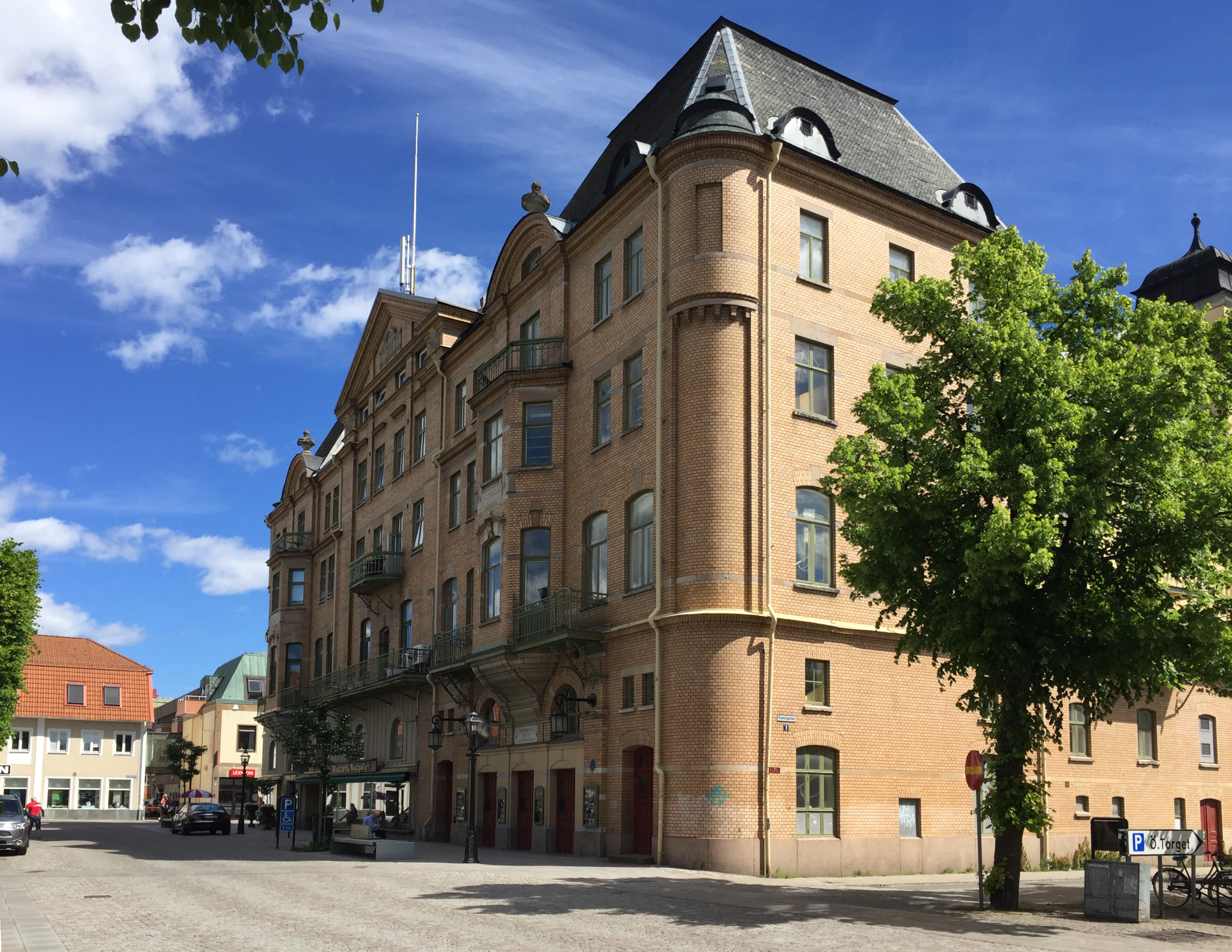 Jönköpings teater. Byggnadsår 1904. Arkitekt August Atterström